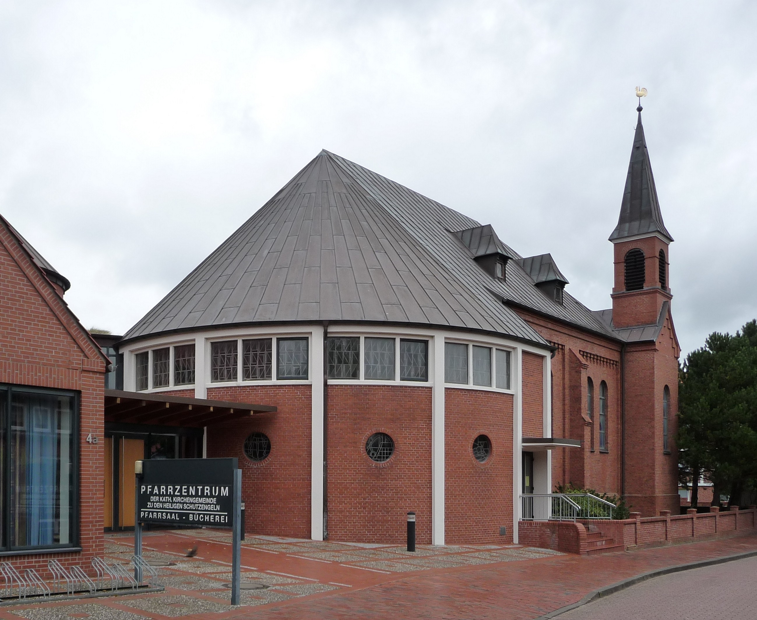 Pfarrzentrum und katholische Kirche St. Ludgerus (Zu den heiligen Engeln) auf der ostfriesischen Nordseeinsel Juist (Niedersachsen, Deutschland)